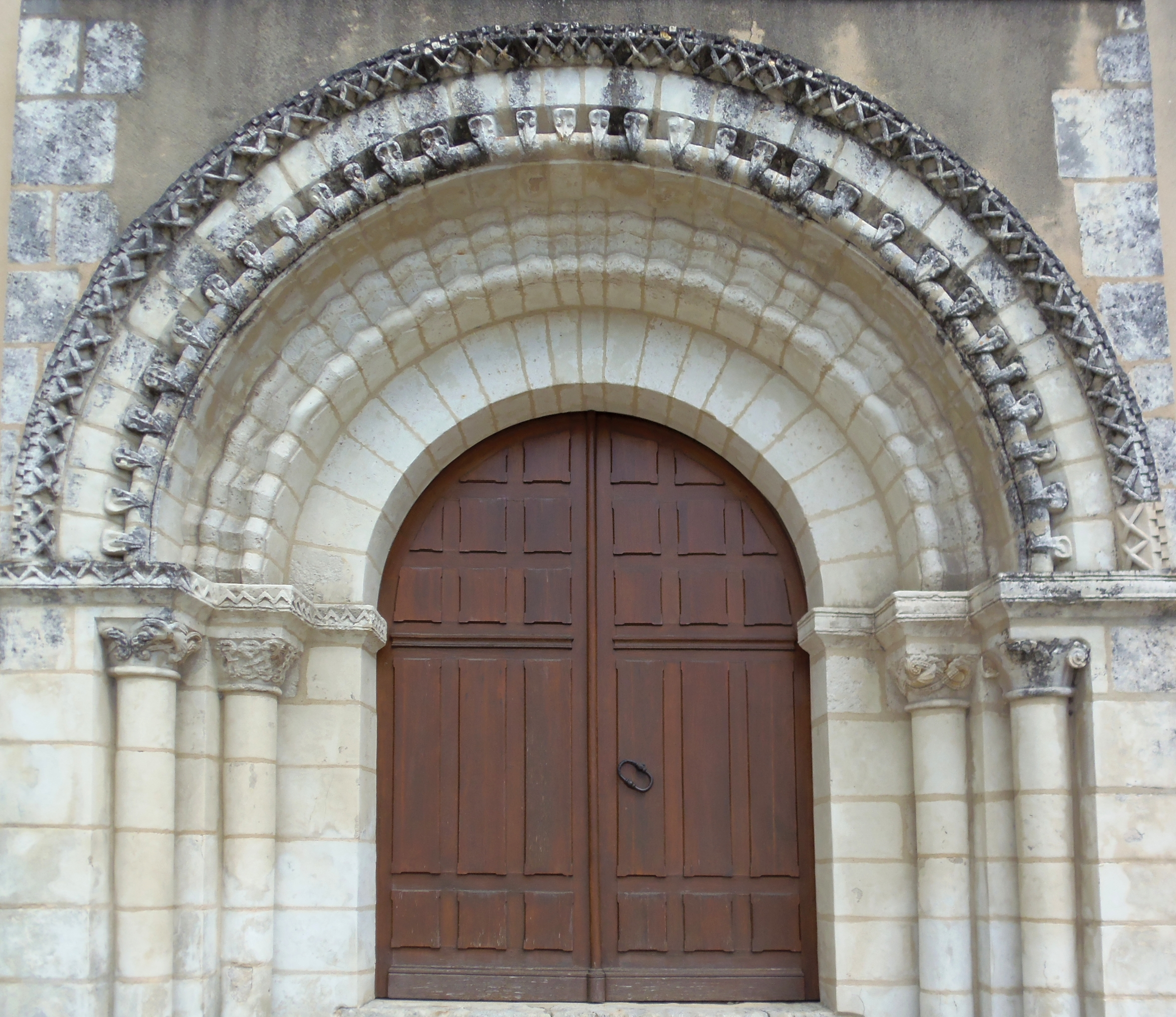 Bazoches-sur-Hoëne (Normandie, France). Le portail de l'église Saint-Pierre.